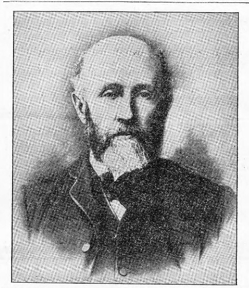 Syr Arthur Cowell-Stepney